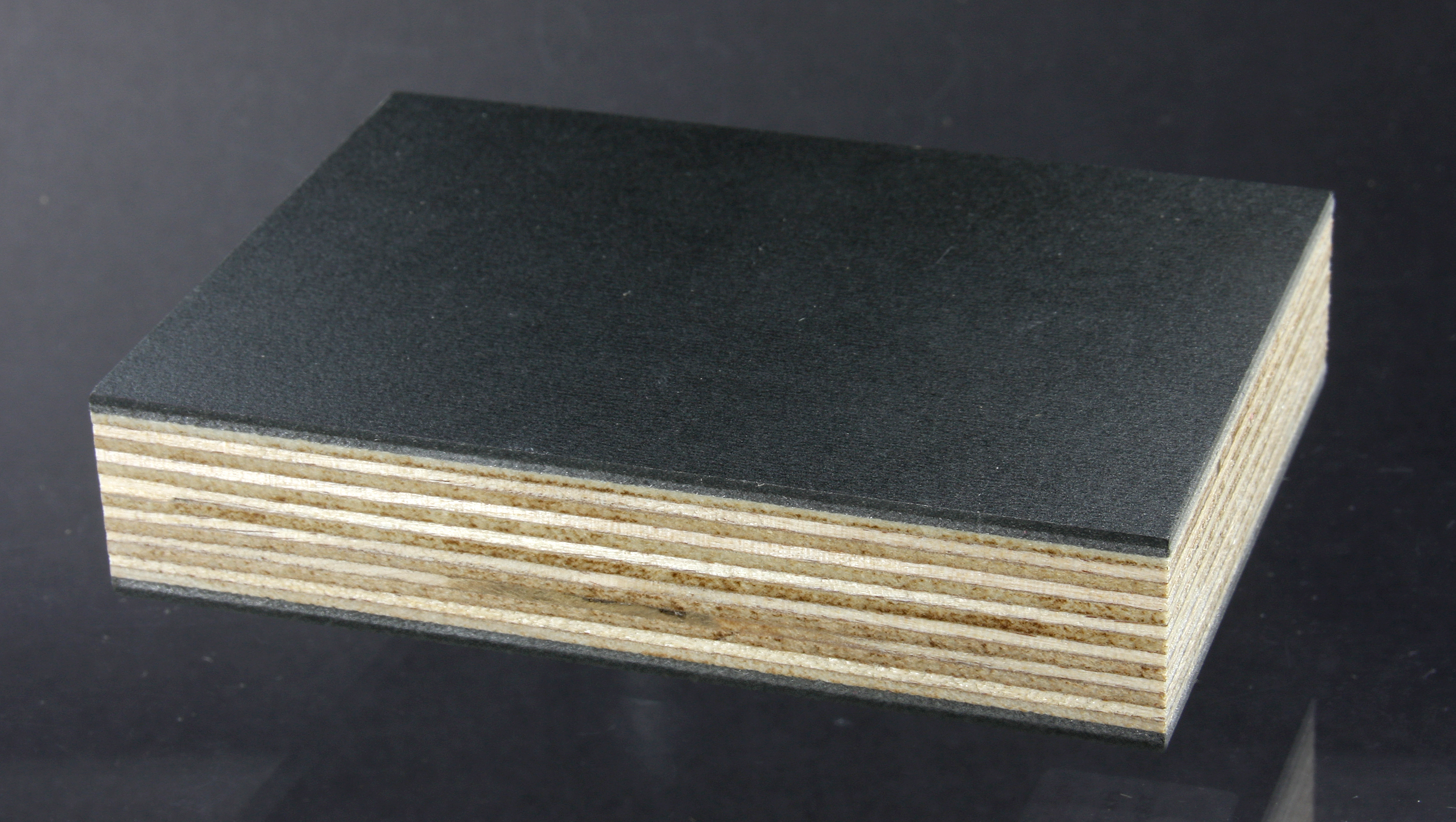 Sperrholz, linoleumbeschichtet